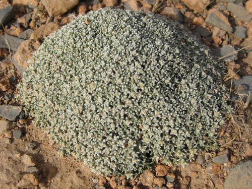 Anabasis aretioides Moq. & Coss. ex Bunge (Syn. Fredolia aretioides). Al sur de Kenifra (Marruecos)